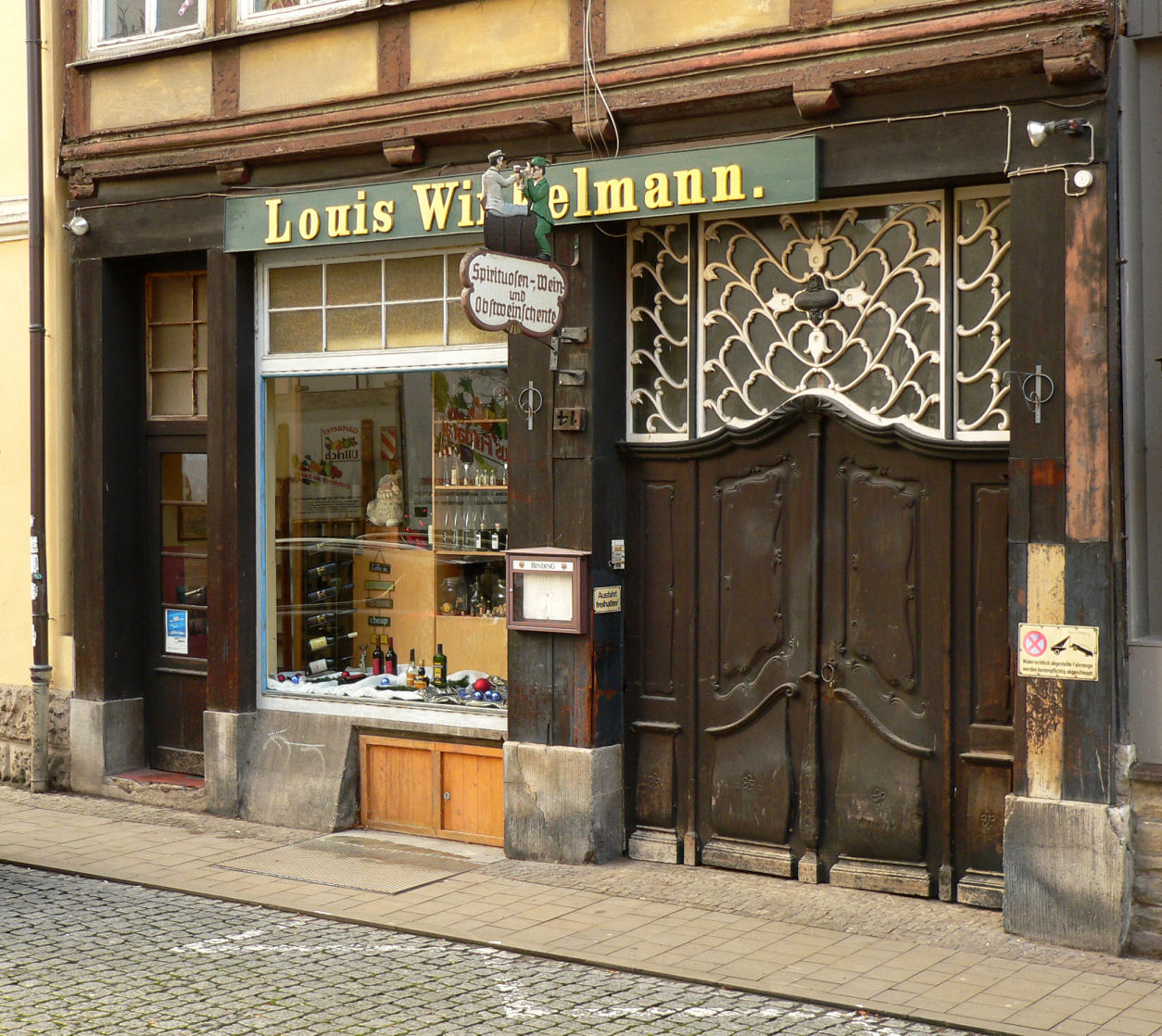 Weinstube und Laden Louis Winkelmann in Hann. Münden